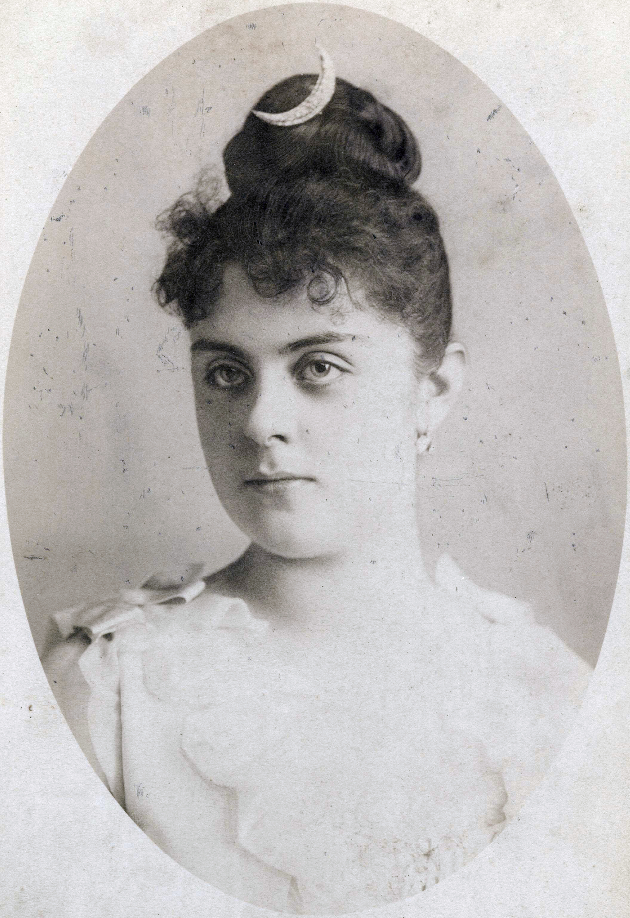 Portrait Mary Vetsera